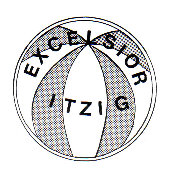 Brun